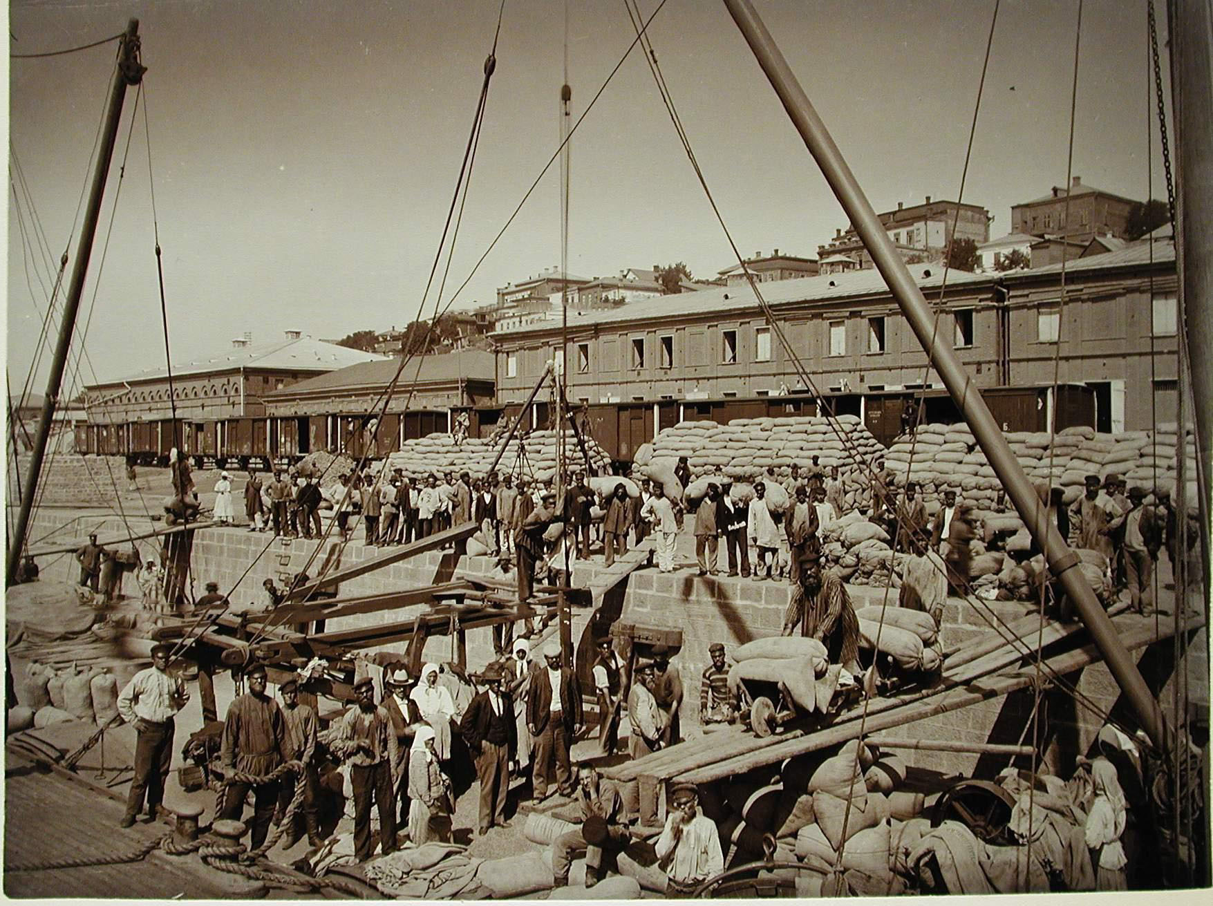 Загрузка мешков с товаром, выгруженным из железнодорожных вагонов, на баржу.